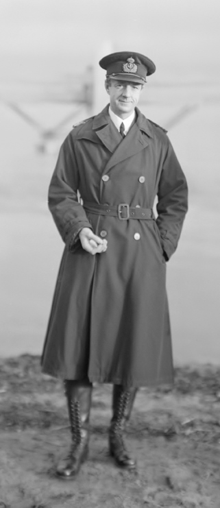 Motiv: Porträtt, Kapten Egmont Tornberg.Tidsperiod 1932-11-24.Ur: Gamla Malmen-samlingen. GM 713